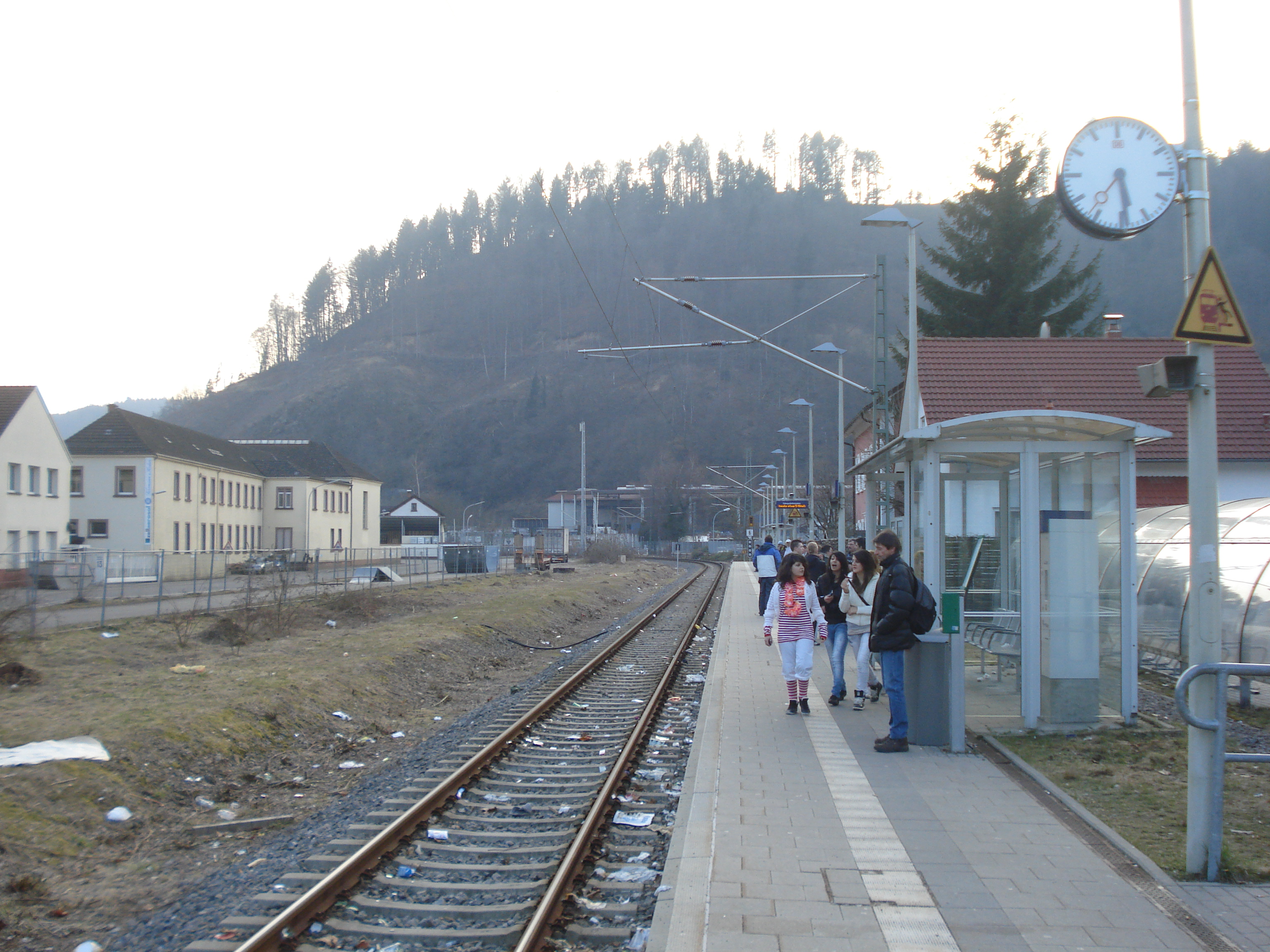 Le quai de la gare de Zell im Wiesental